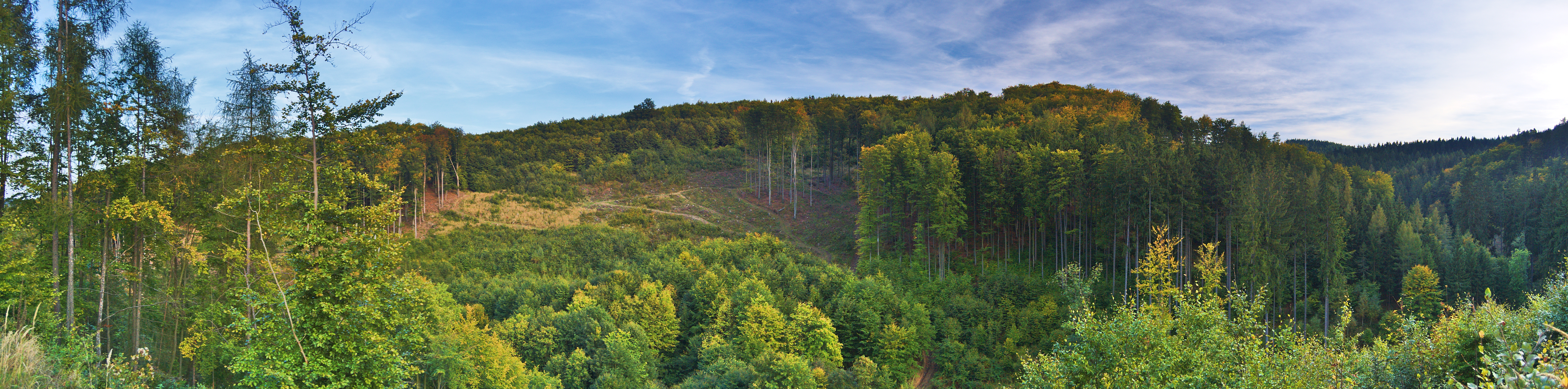 Výhled ze zříceniny hradu Plankenberk, Zálesí, Biskupice, okres Svitavy